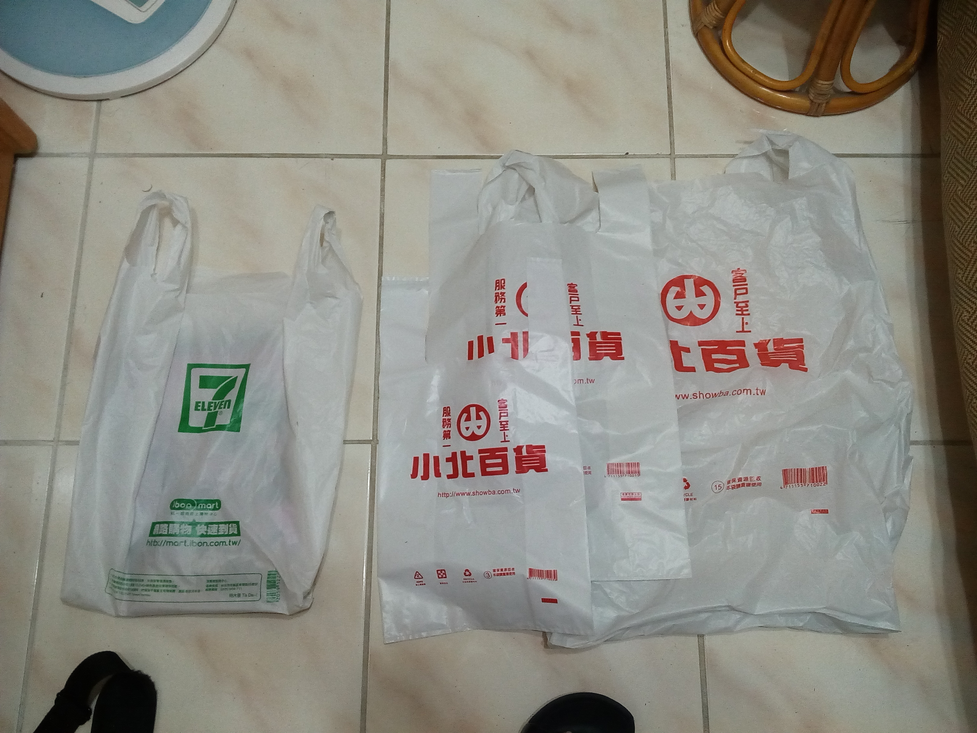 統一超商與小北百貨所提供的塑膠購物袋